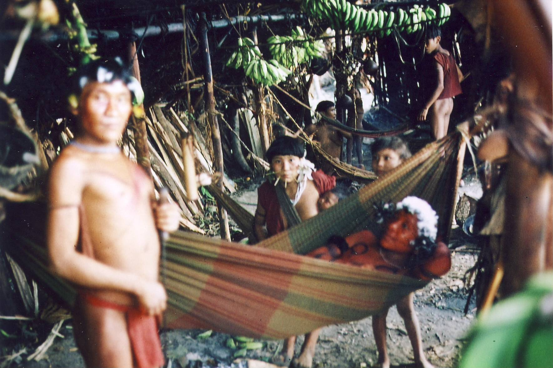 Ineres eines Schabono 4